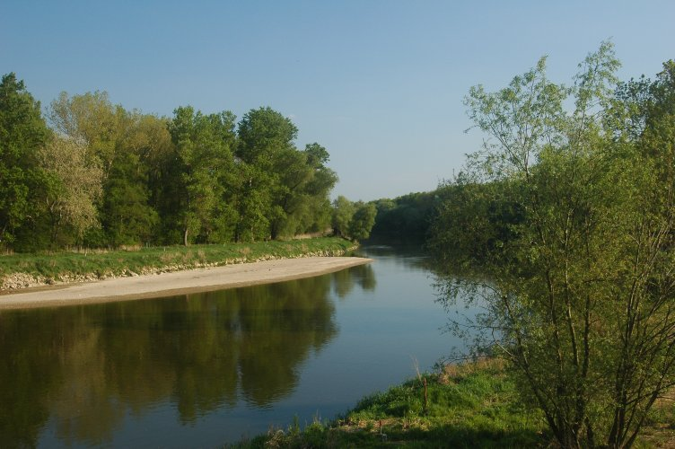 Morava between Austria and Slovakia (Hohenau an der March and Moravský Svätý Ján)